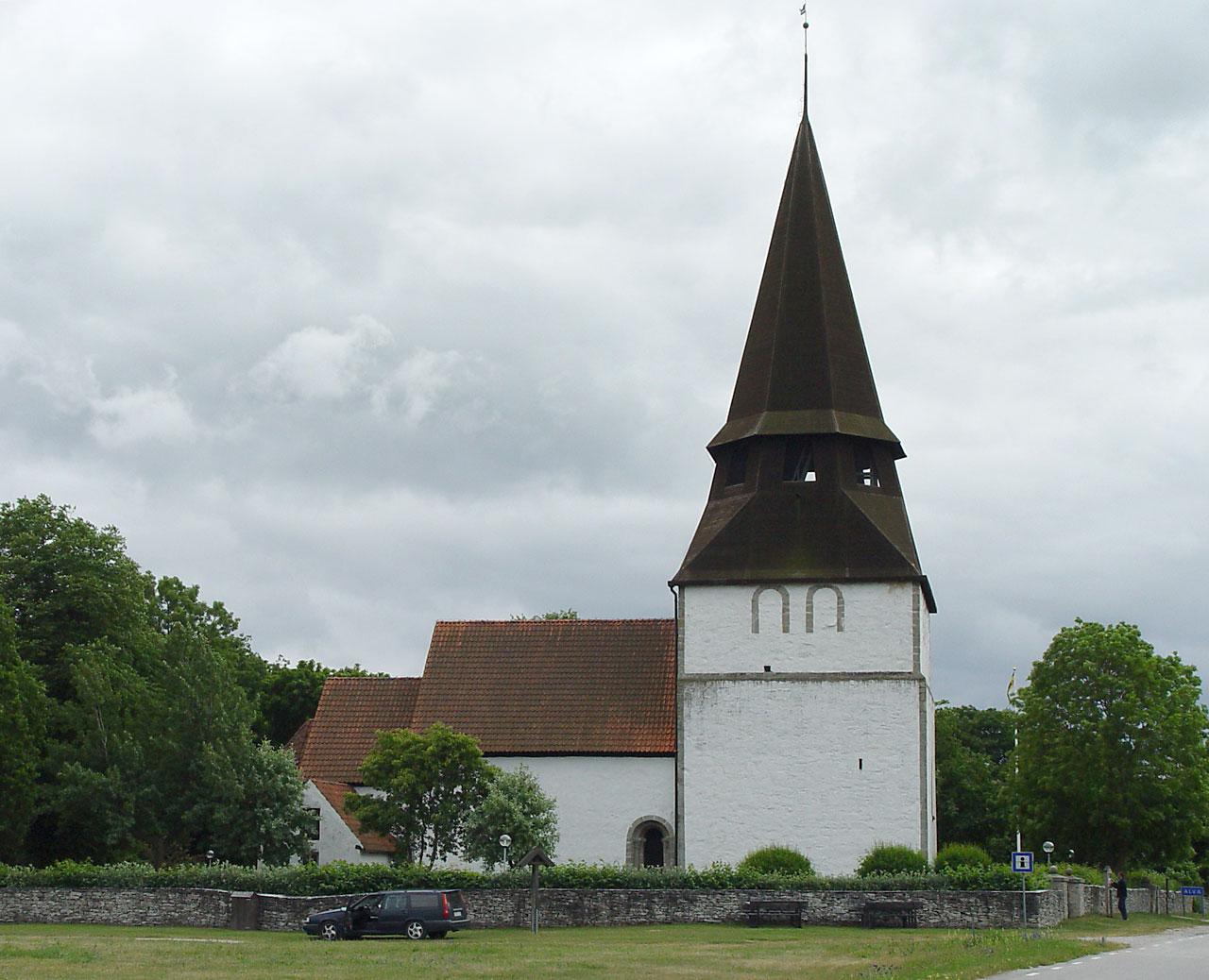 Alva-Kirche auf Gotland. Eingeweiht 1221.